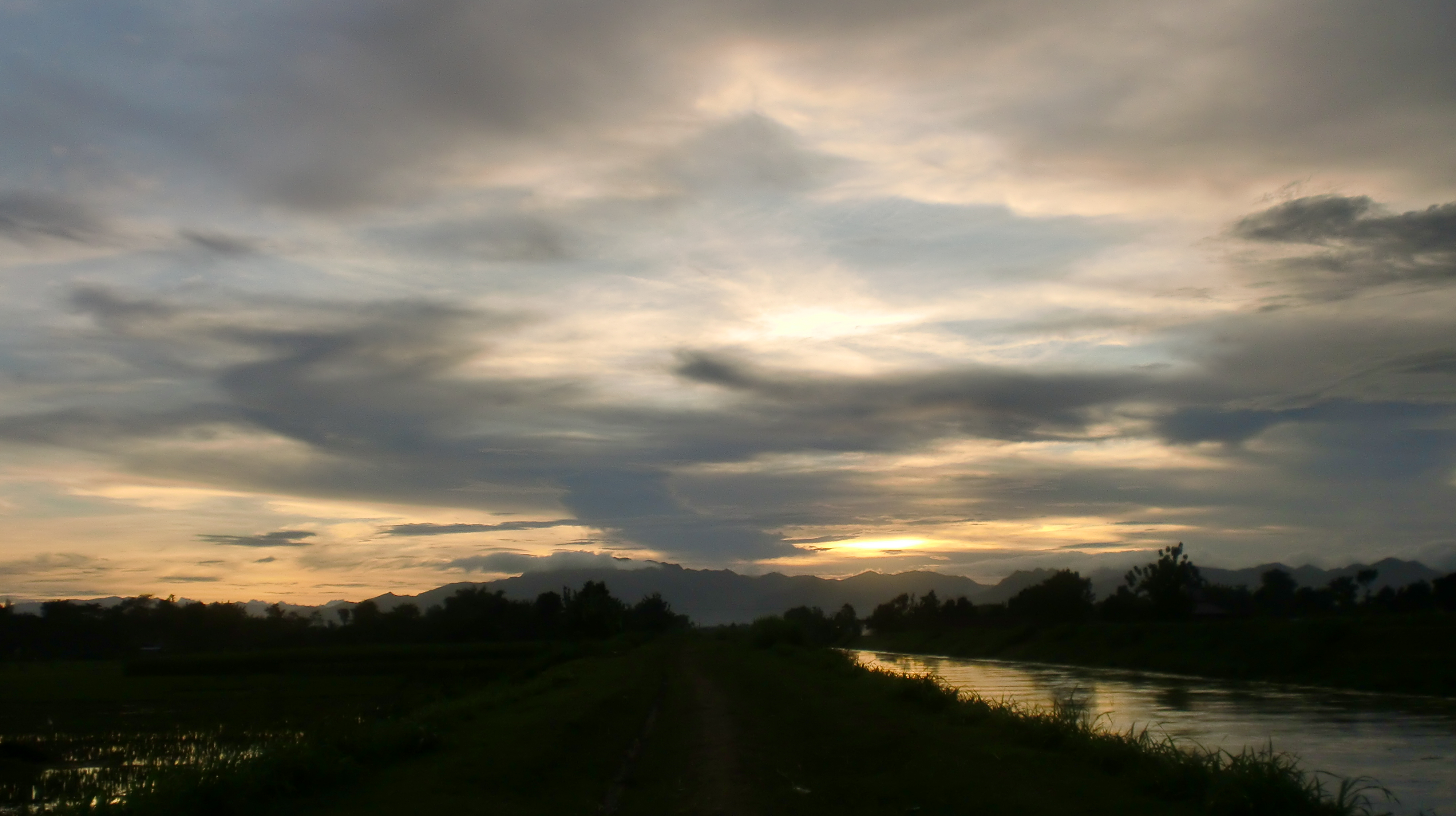 Senja berawan di perbatasan Boyolangu-Bono